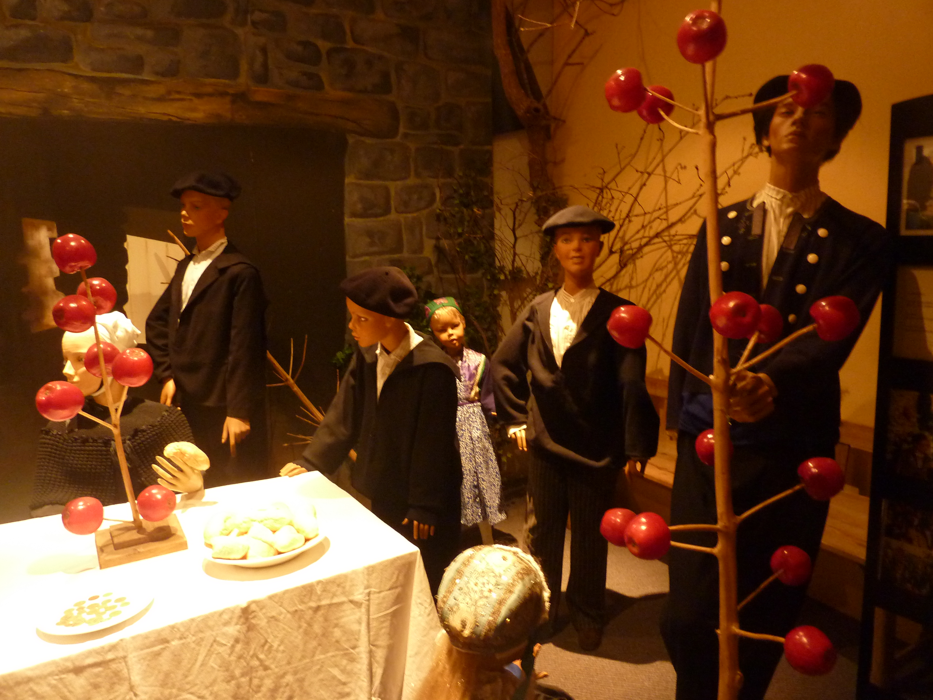 Plougastel-Daoulas : arbres à pommes (Musée de la fraise et du patrimoine)